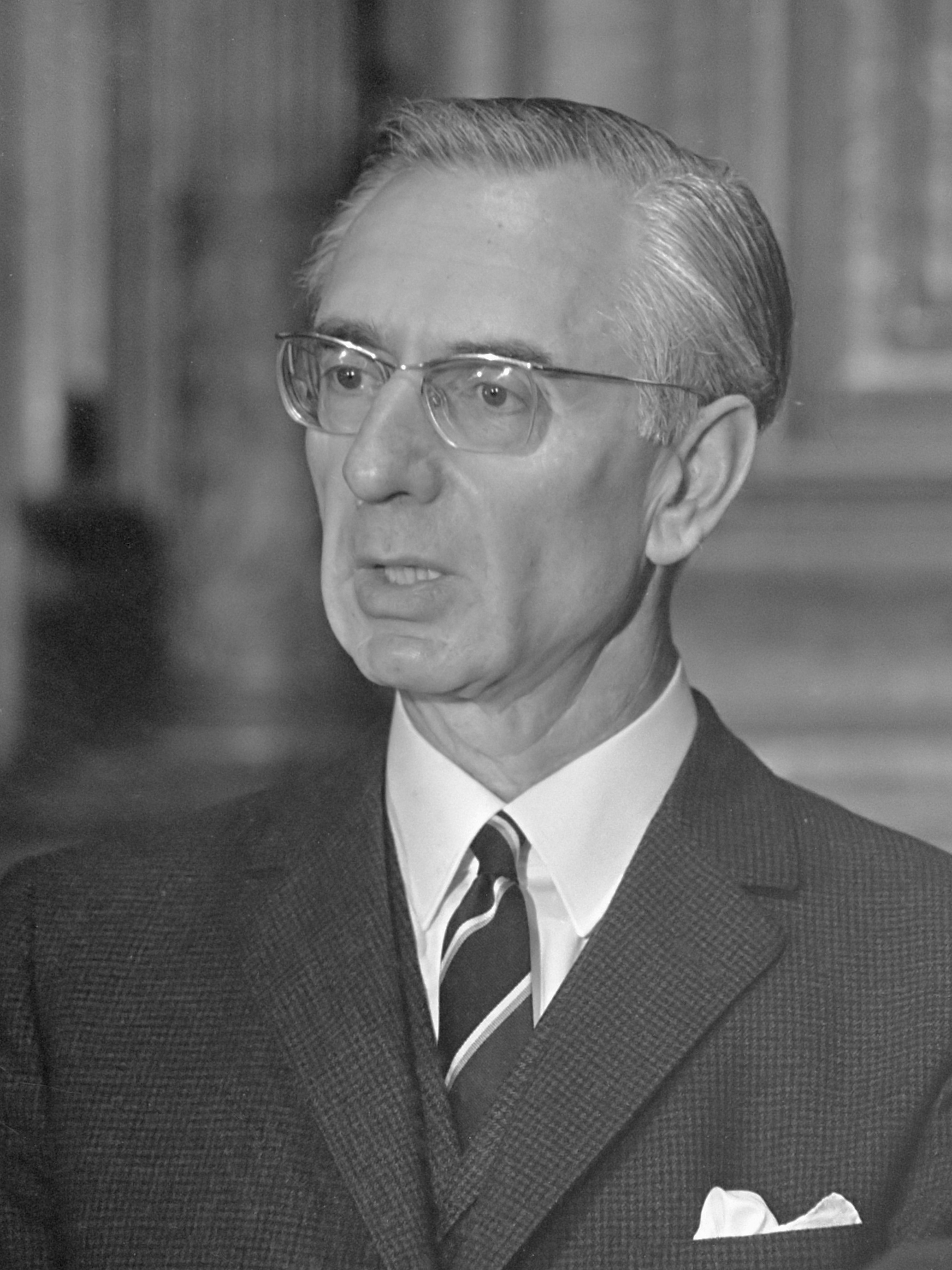 Herdenking van de 350ste sterfdag van Bredero. Prof. dr. A.G.H. Bachrach 26 september 1968